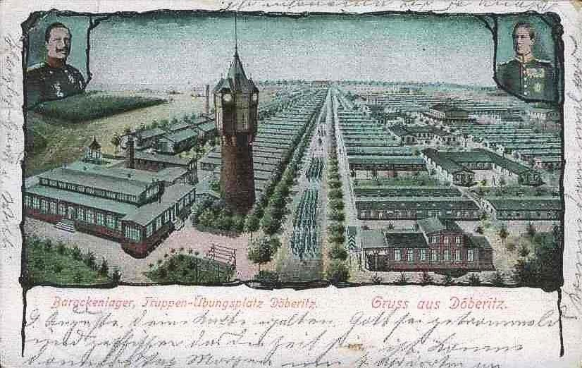 Tuppenübungsplatz in Döberitz